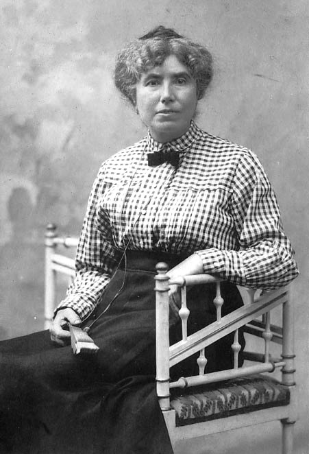 Alexandra Murguía de Castro (1859-1937)